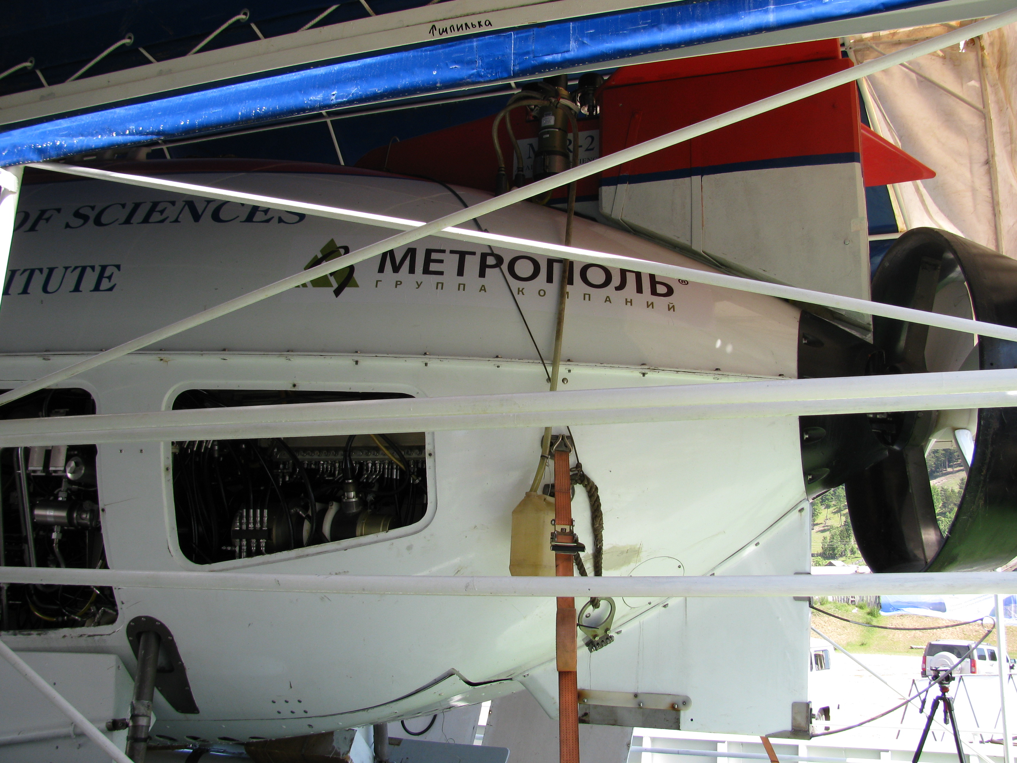 Глубоководные обитаемые аппараты МИР-1 и МИР-2 на барже в порту села Турка на озере Байкал.